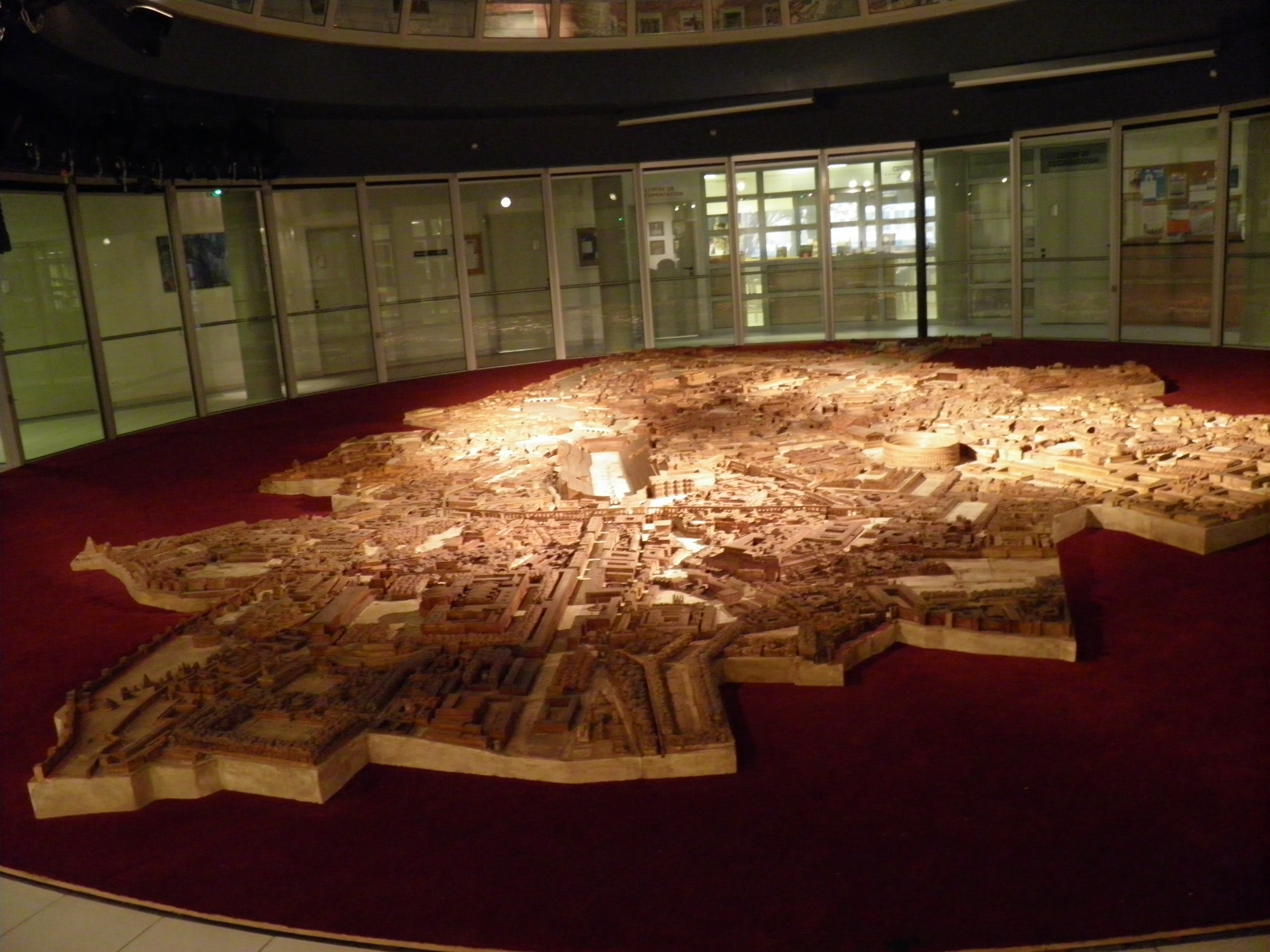 Vue générale, plan de Rome de Paul Bigot université de Caen MRSH